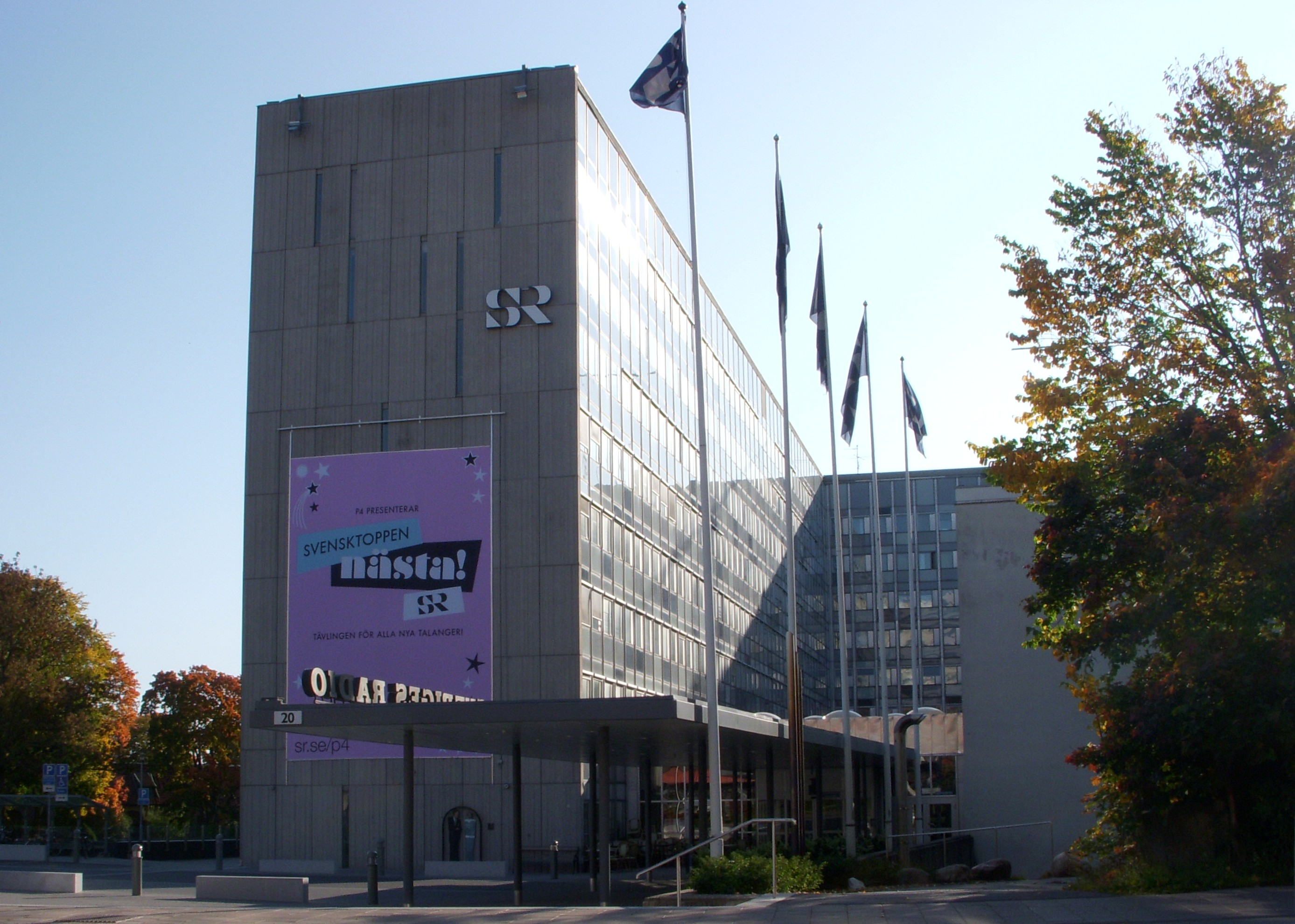 Sveriges Radio, byggnad i Stockholm